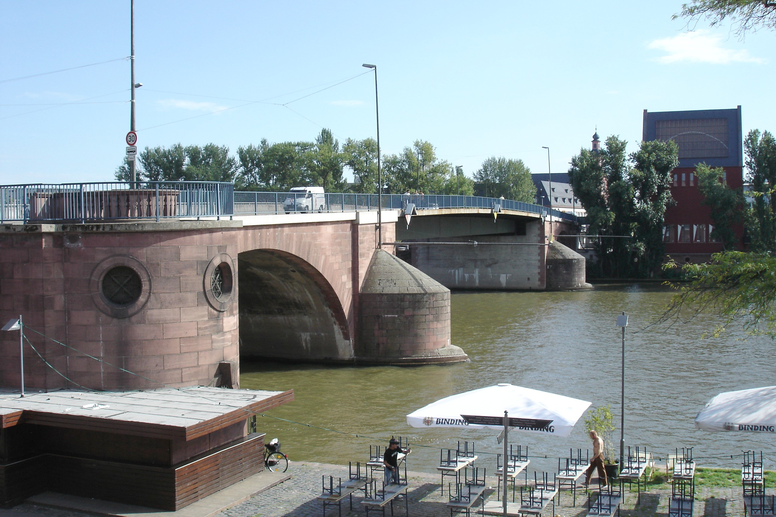 "Alte Brücke" mit "Neuer Portikus" in Ffm, Blick nach (Süden) Ffm-Sachsenhausen